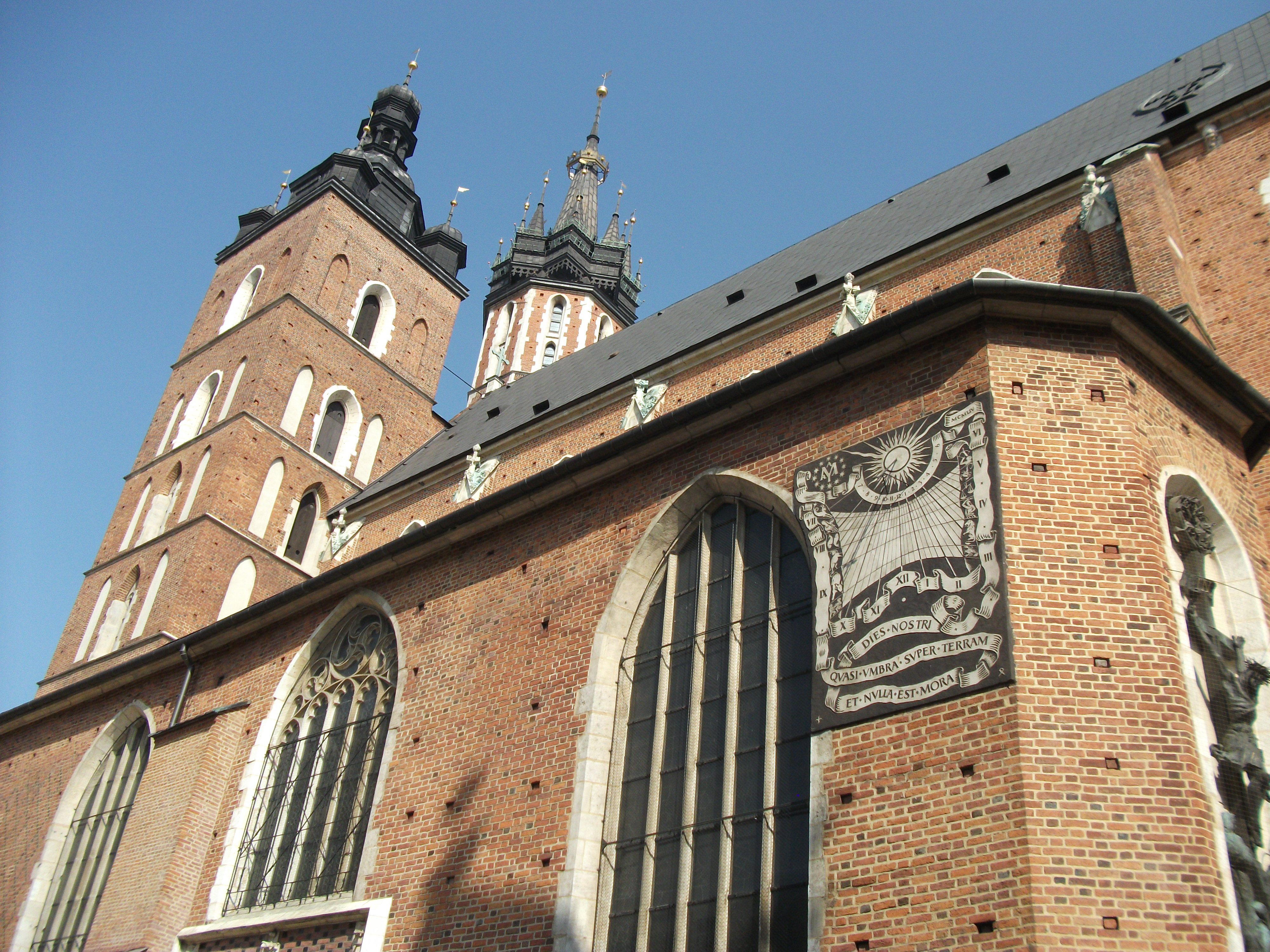 Bazylika Mariacka p.w. Wniebowzięcia NMP w Krakowie